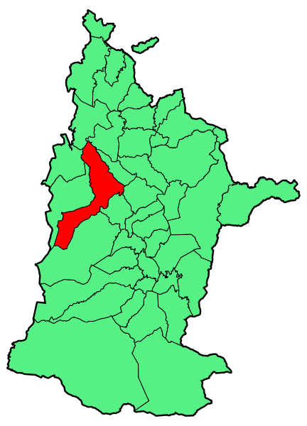 Aipaturiko udalerriaren kokapena Zuberoan